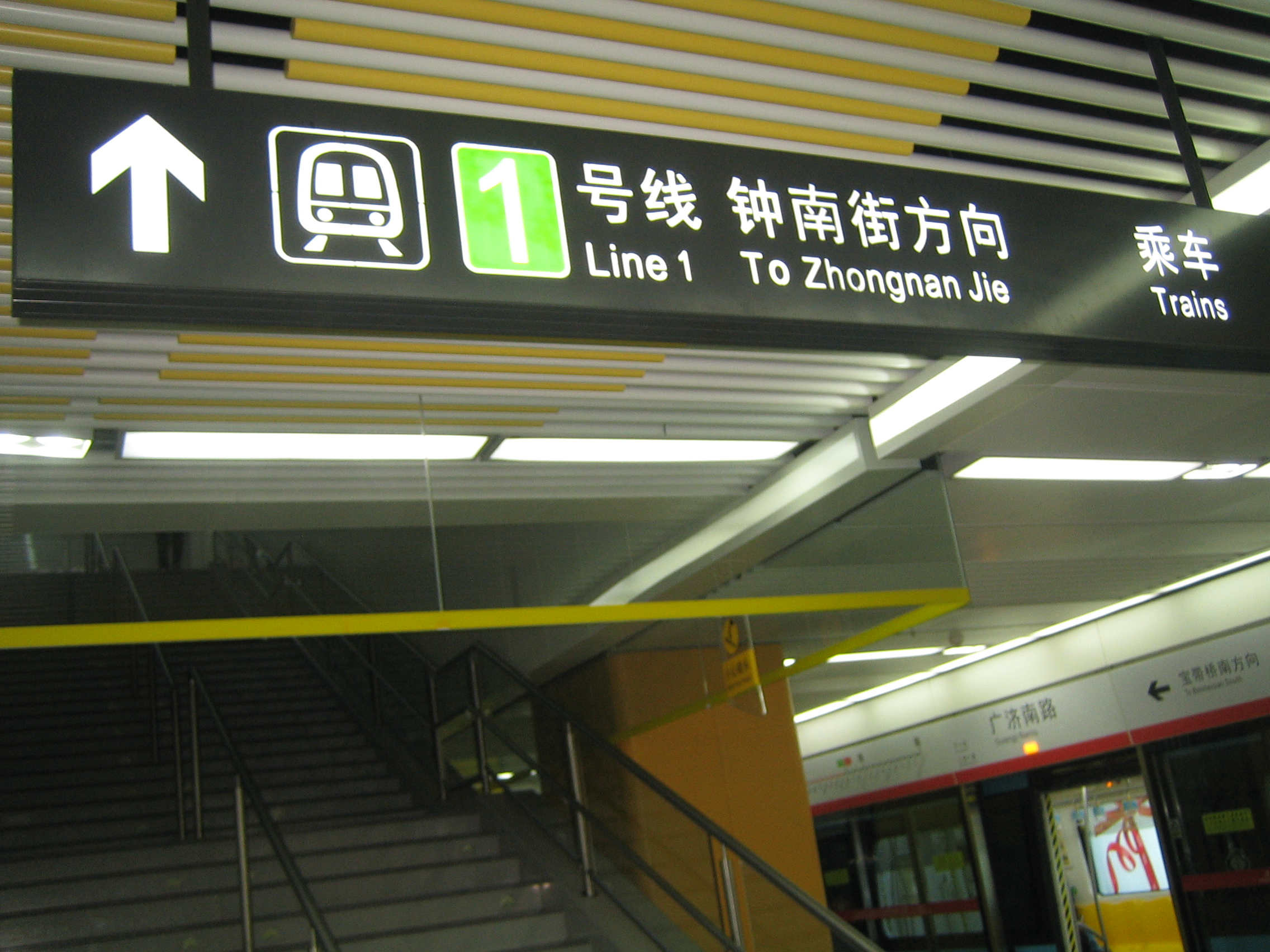 中文（中国大陆）: 苏州地铁广济南路站2号线站台上的换乘指示牌